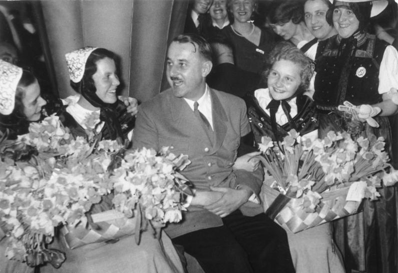 "Das Fest der deutschen Reise". Am Sonnabendabend fand in sämtlichen Festsälen des Berliner Zoo das "Fest der deutschen Reise", das die grossen Verkehrsorganisationen veranstalteten und das für Reise und Erholung für alle Volksgenossen warb, statt. Trachtenabordnungen aus sämtlichen deutschen Gauen waren eingetroffen und boten ein farbenfrohes, buntes Bild. Der bayrische Staatsminister Esser, der Vorsitzende des Bundes deutscher Verkehrsvereine und Bäder, inmitten einer Gruppe entzückender Wiesbadener Blumenmädchen. Text ohne Gewähr! Scherls Bilderdienst, Berlin SW 68.